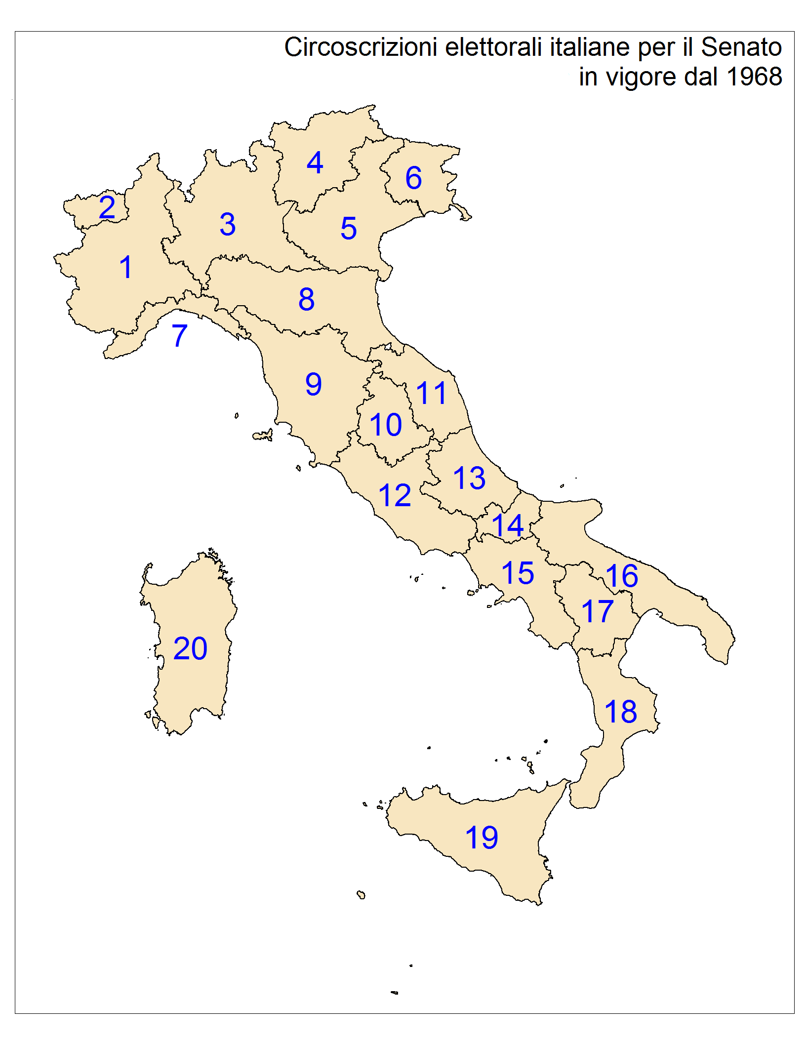 Mappa delle circoscrizioni elettorali italiane in vigore trail 1968 e il 1992 per il Senato della Repubblica.